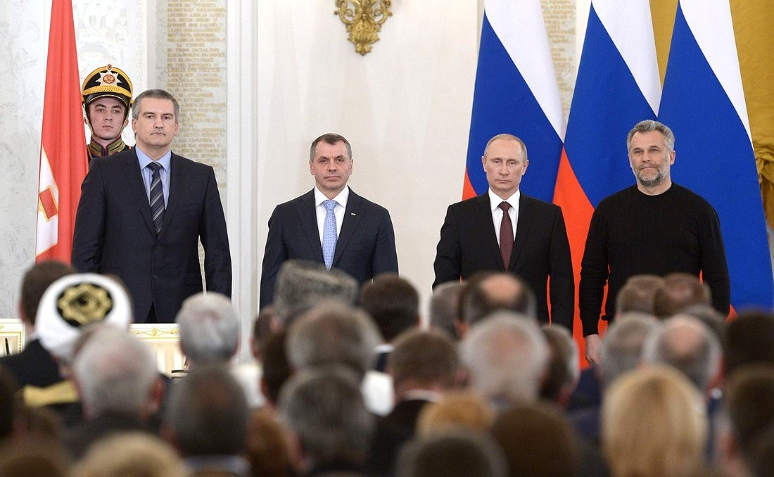 Подписание Договора о принятии Республики Крым в Российскую Федерацию